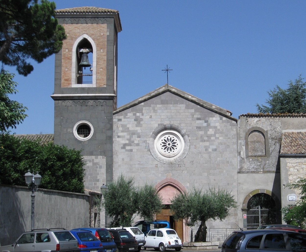 Chiesa di Sant'Antonio, Melfi, Basilicata